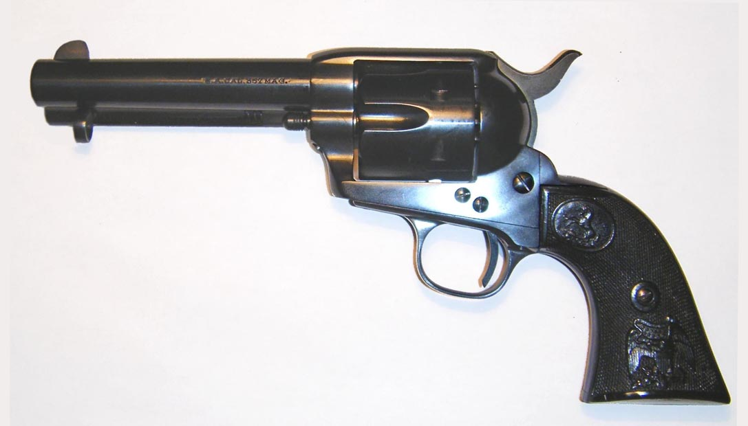 Colt Sigle Action 1873 (A.Uberti made)